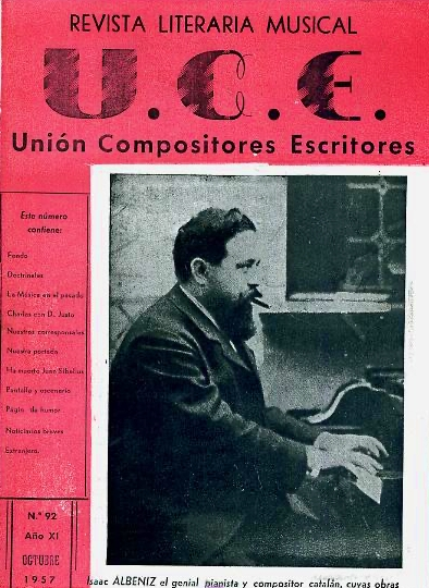 Portada de ejemplar (nº 92) de la revista U.C.E., editada por Juan Guerrero Urreisti. Revista musical y literaria.